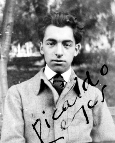 Fotografía del joven Pablo Neruda (1904–1973) de medio cuerpo y de frente. Aparece Neruda serio frente a la cámara, hasta la mitad del pecho. Viste chaqueta clara y corbata oscura. Tiene el cabello corto penado hacia atrás levemente levantado. En el lado derecho inferior firme diagonalmente “Ricardo Reyes”